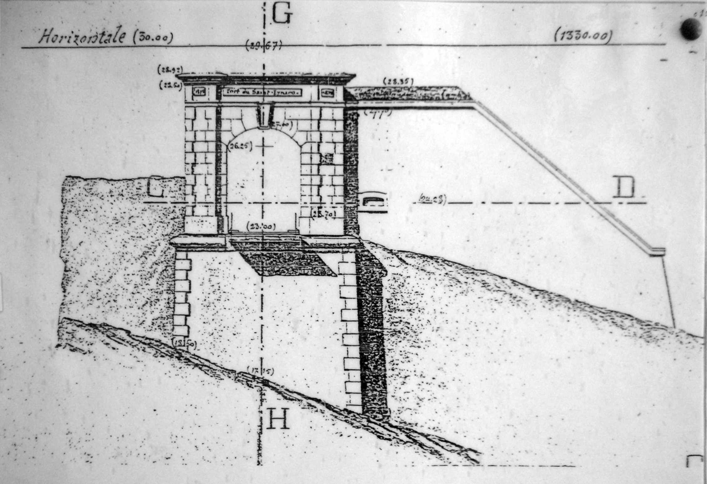 musée du Fort du Saint-Eynard, Le Sappey-en-Chartreuse, Isère, France.